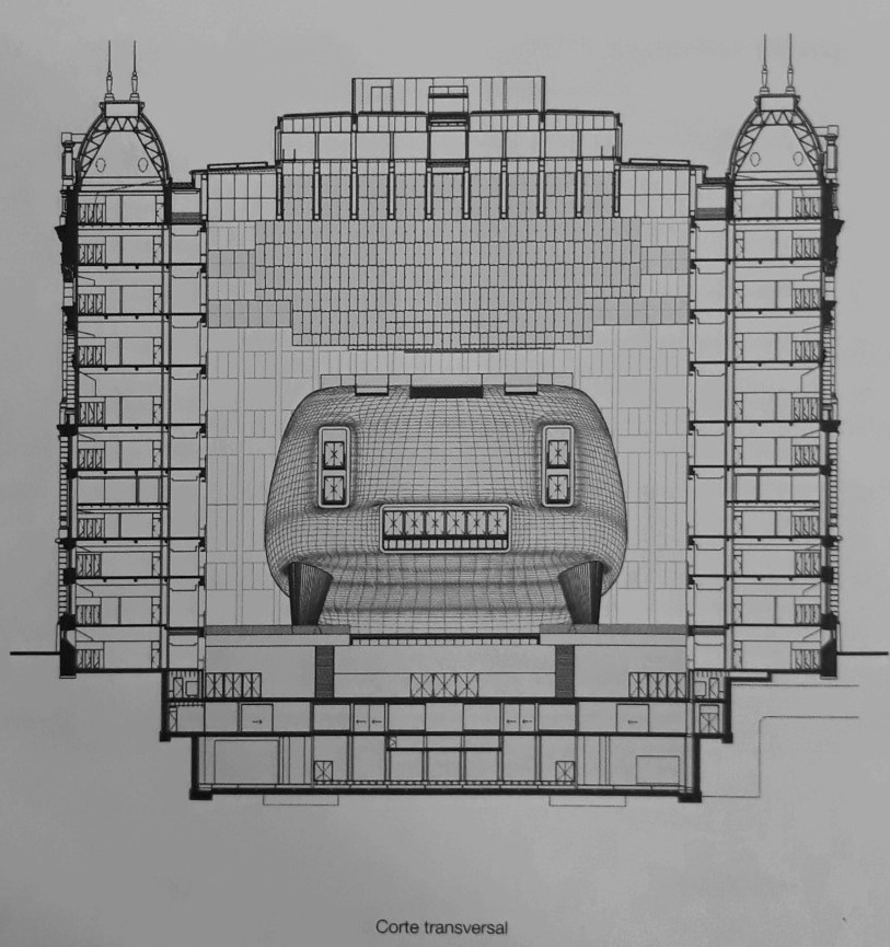 Palacio de Correos, proyecto centro cultural del Bicentenario